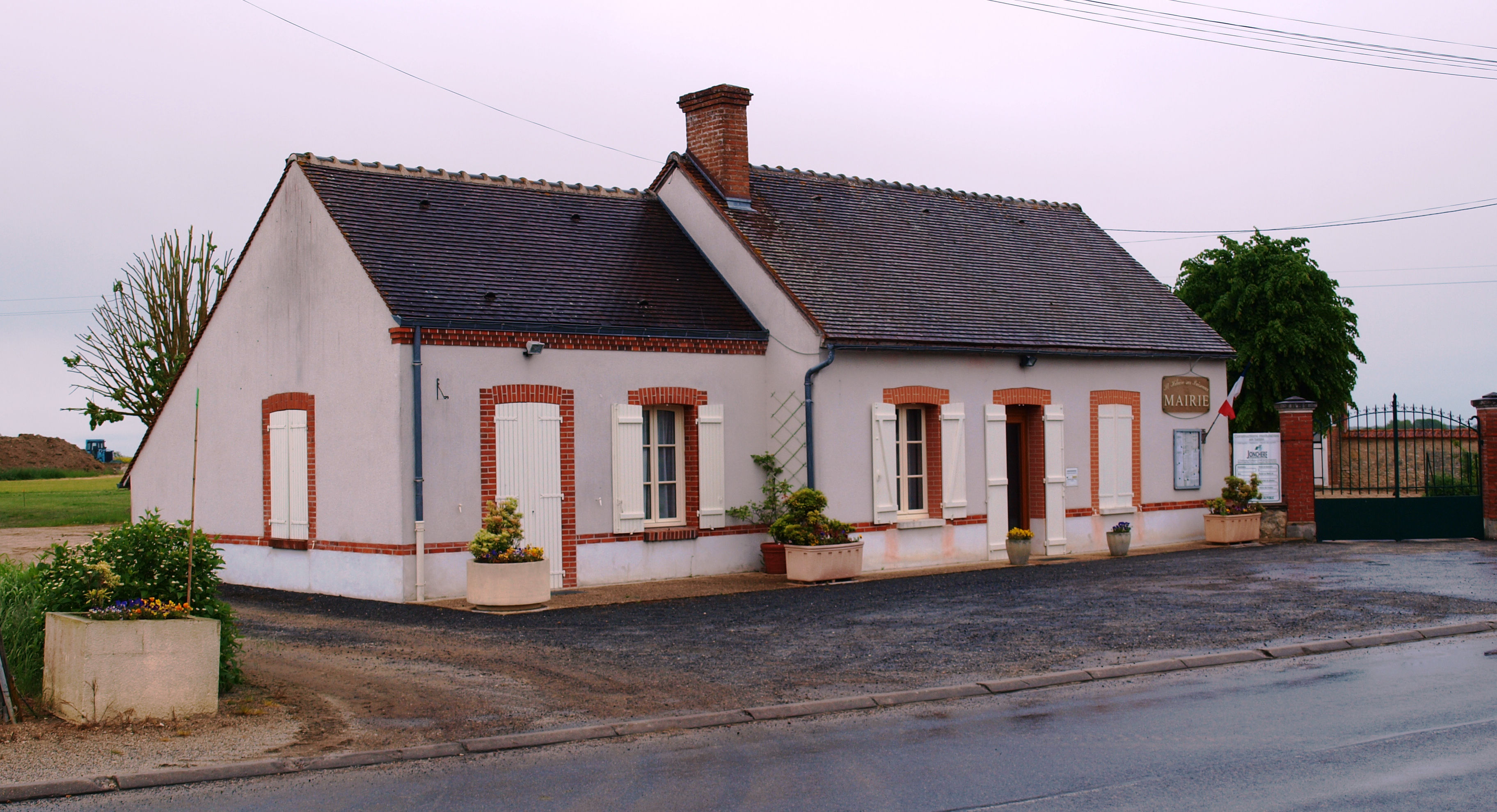 Saint-Hilaire-sur-Puiseaux (Loiret, France), la mairie